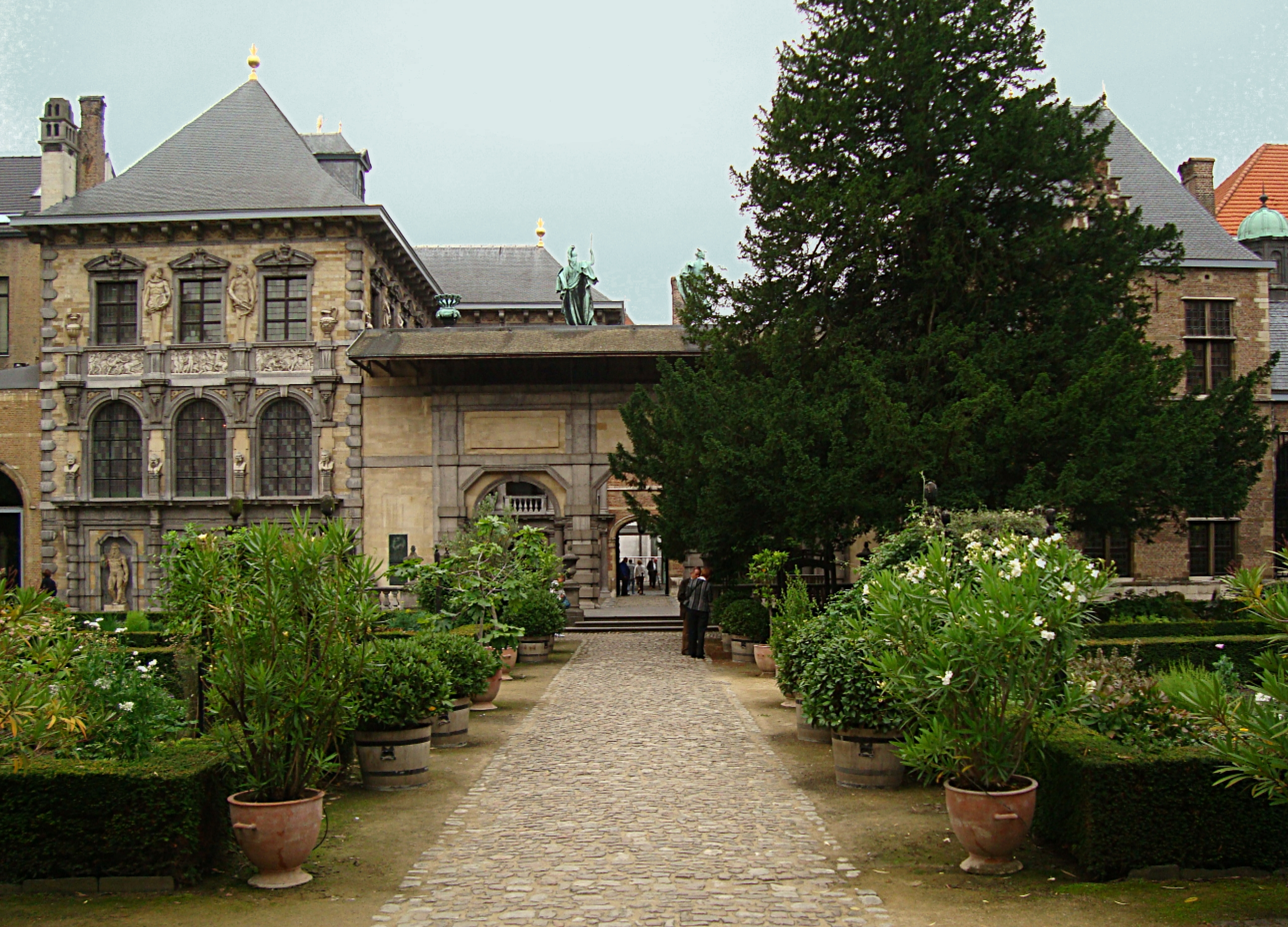 Vue intérieure, depuis le jardin, de la maison de Rubens à Anvers (Belgique).